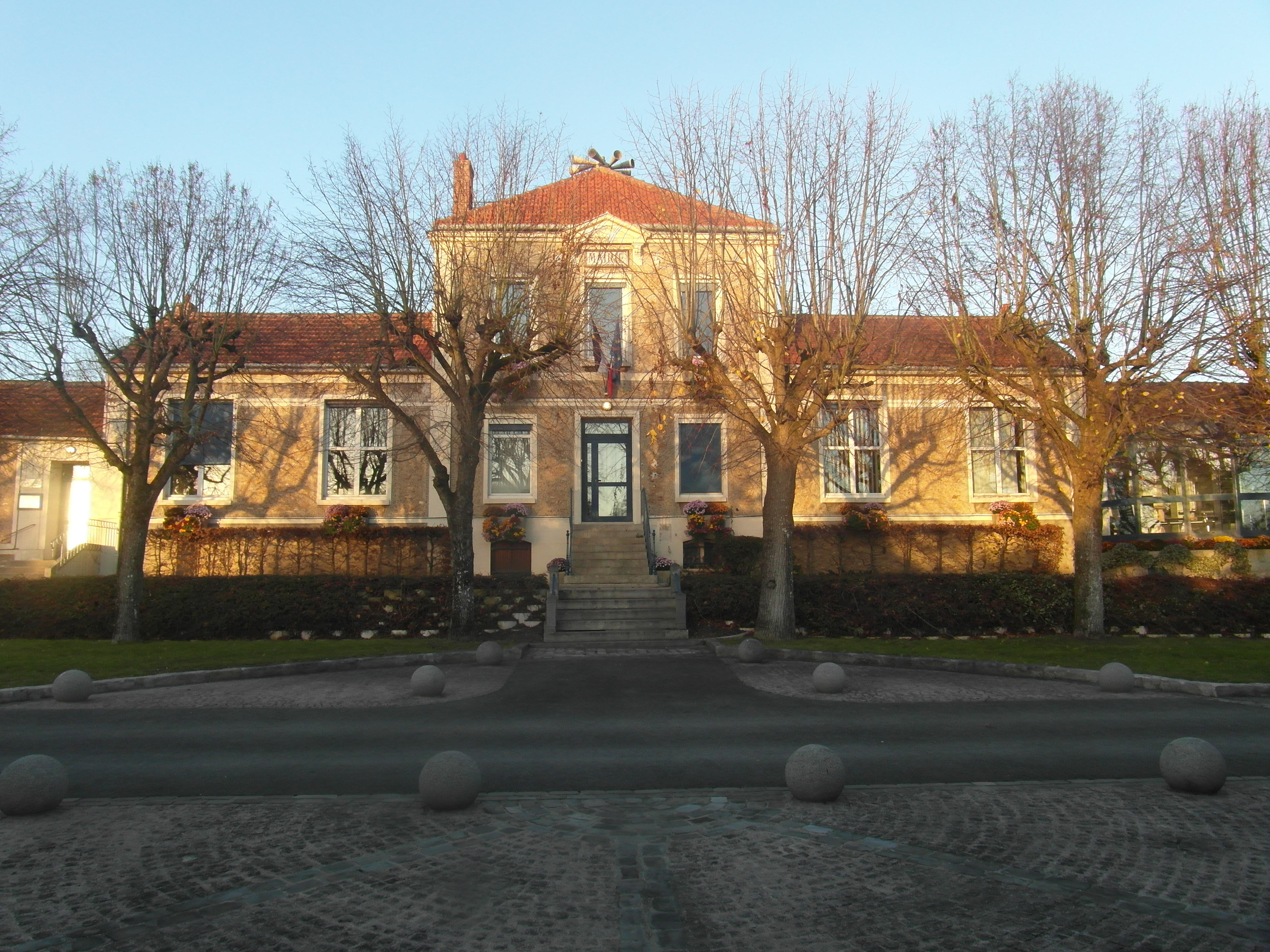 Mairie de Santeny (Val-de-Marne)